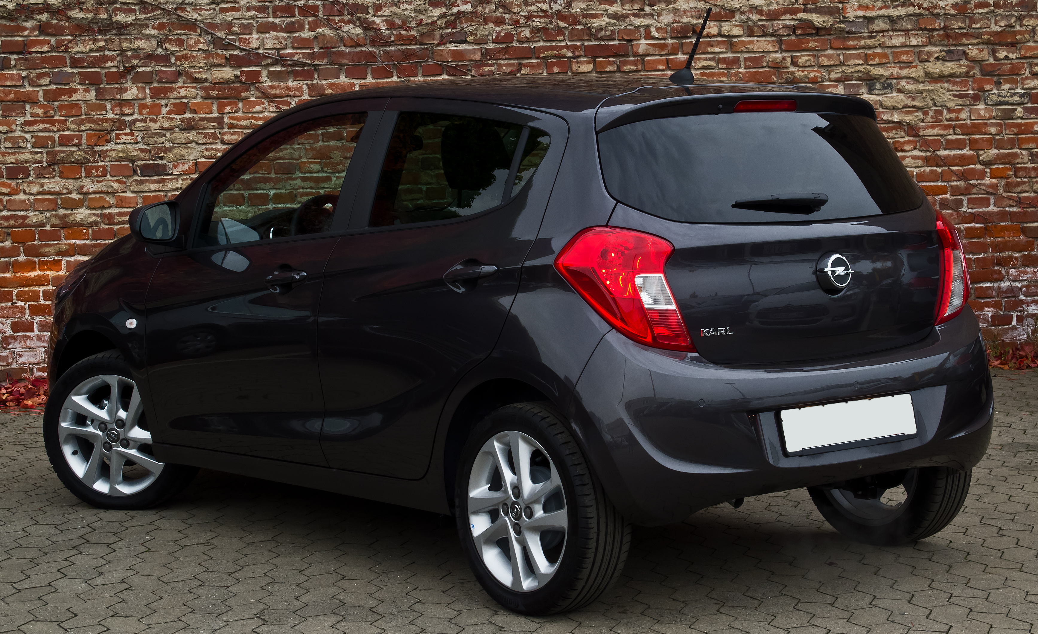 Opel Karl 1.0 ecoFLEX Exklusiv